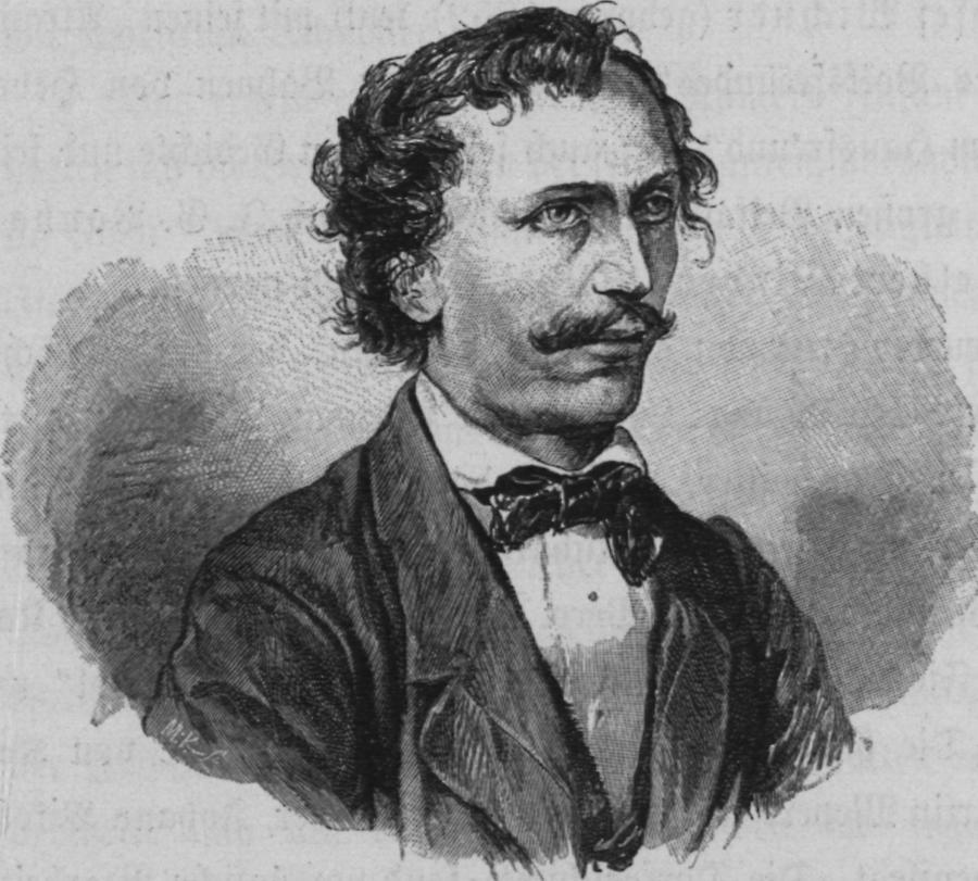 Der Vorarlberger Schriftsteller Franz Michael Felder (1839–1869).